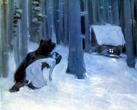 К.А. Коровин К.А., Иллюстрация к роману "Евгений Онегин". Сон Татьяны. 1899 г. Картон, масло. Из собрания ВМП